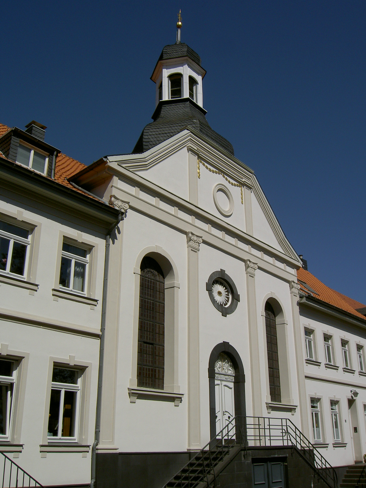 Evgl. Theodor-Fliedner-Kirche in Düsseldorf-Kaiserswerth, Stadtkirche der Diakonie